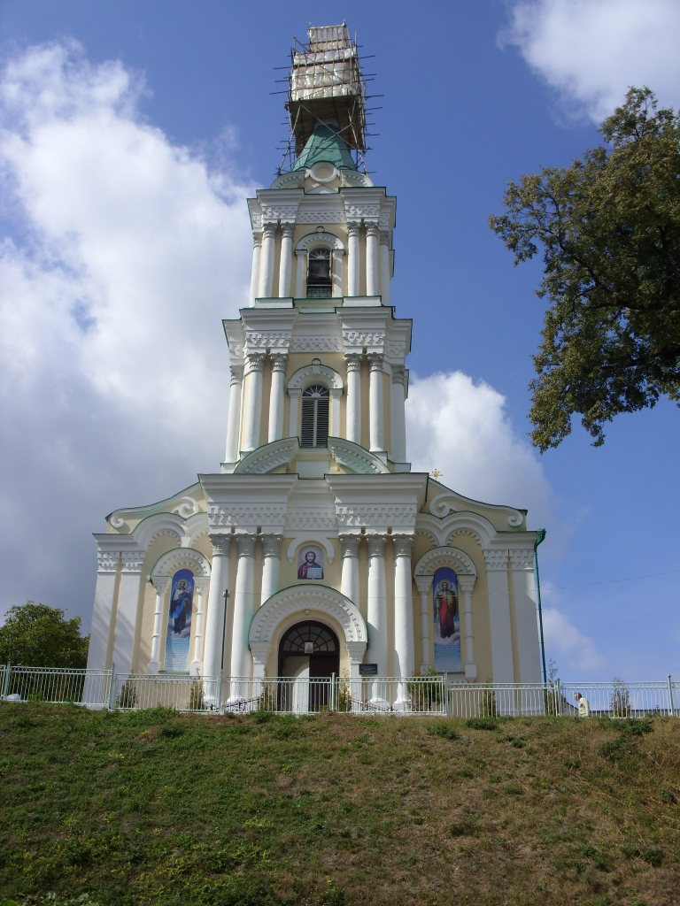 Monaster Objawienia Pańskiego w Krzemieńcu, główna cerkiew